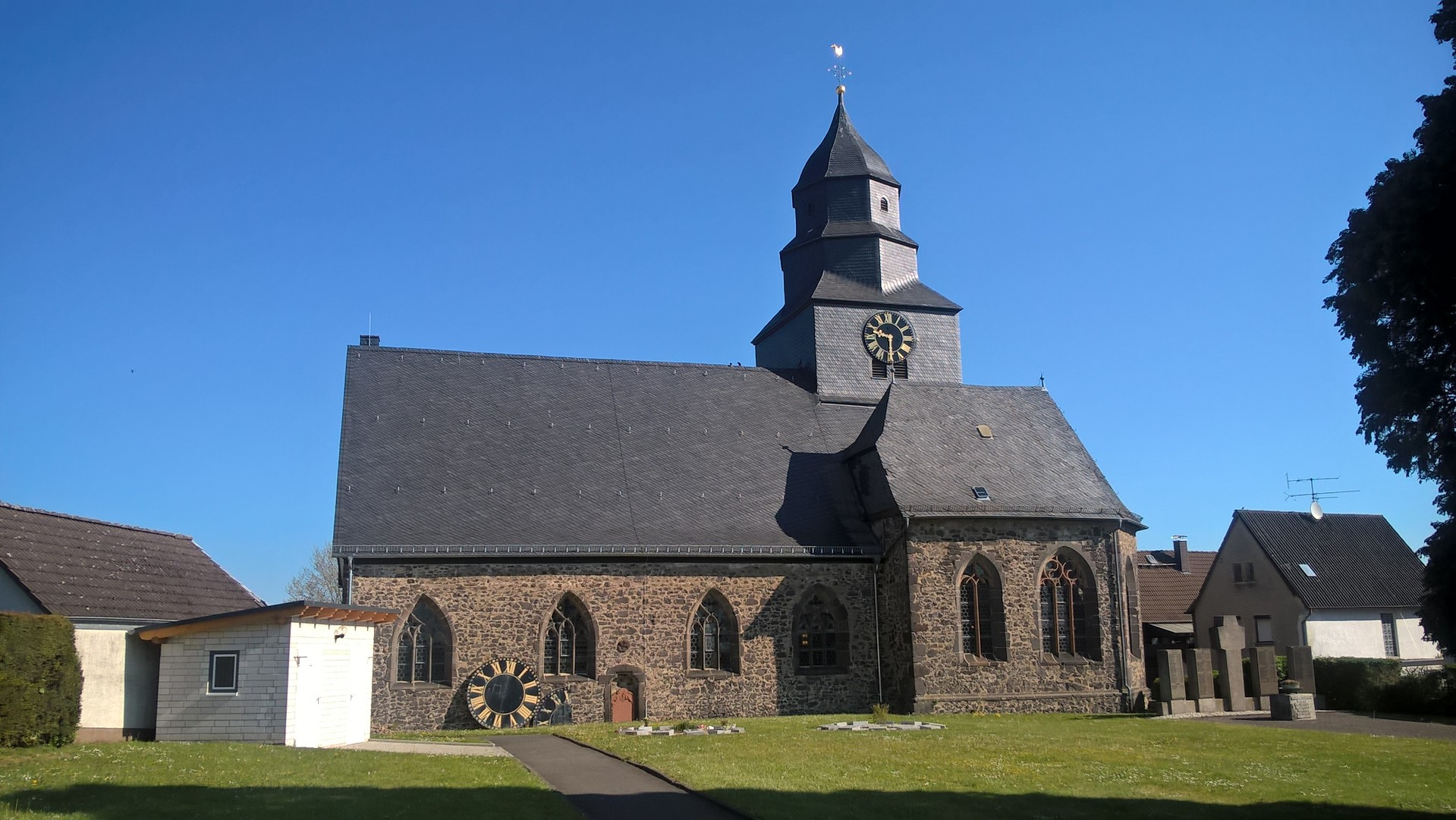 Kirche in Grüningen, Pohlheim, Hessen, Deutschland